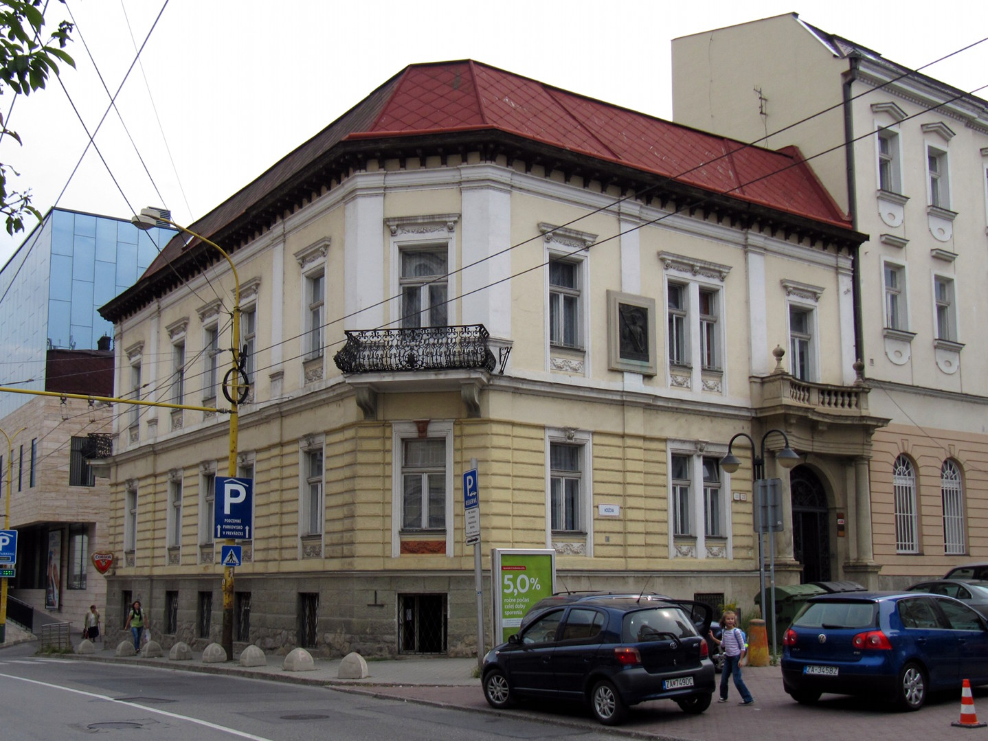 Hodžova ul. 20, Bacherova vila, BUDOVA ADMINISTRATÍVNA PAM. Object location49° 13′ 30.17″ N, 18° 44′ 20.55″ E